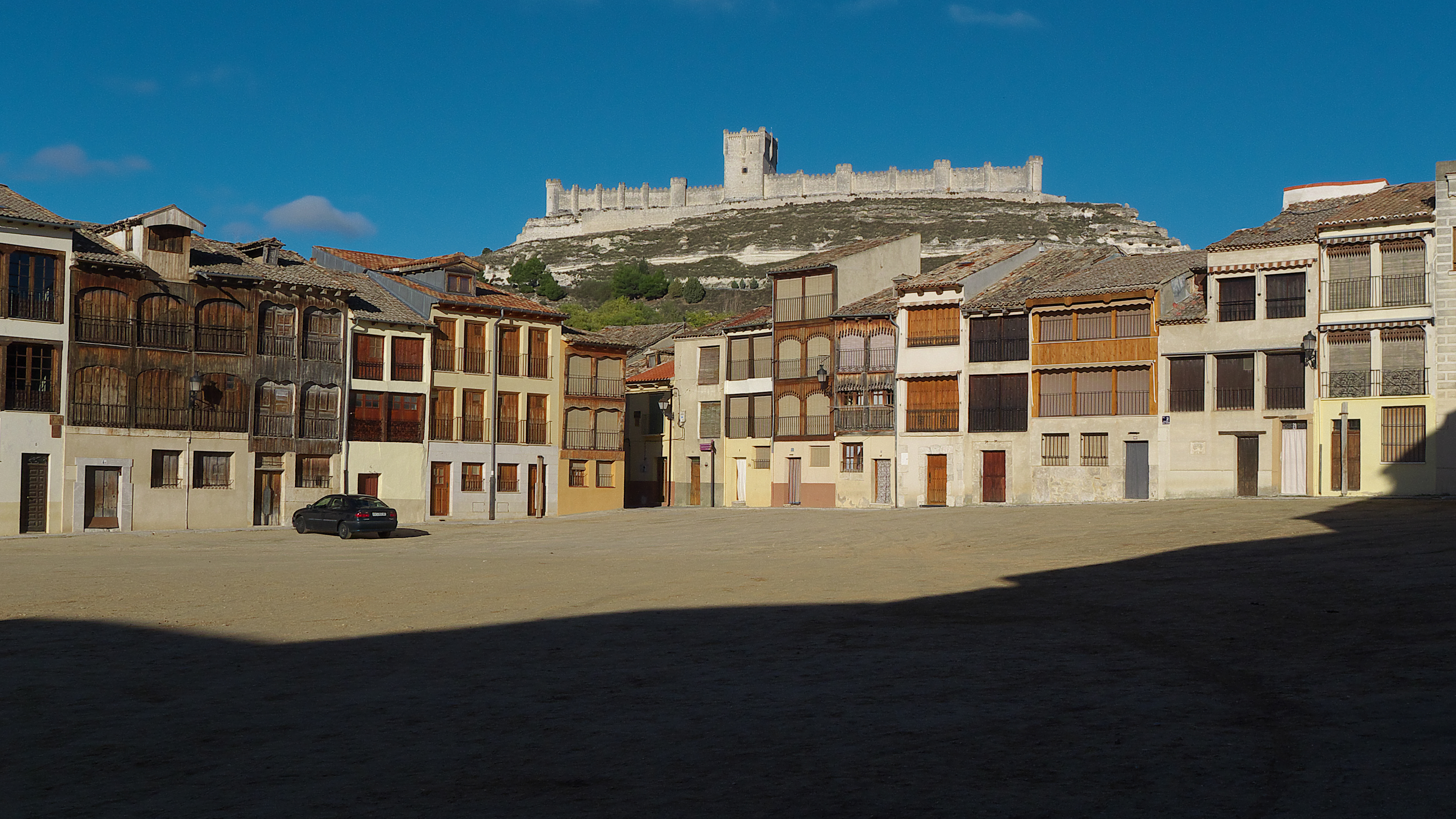 El festejo de toros, todo un acontecimiento en el Peñafiel medieval.